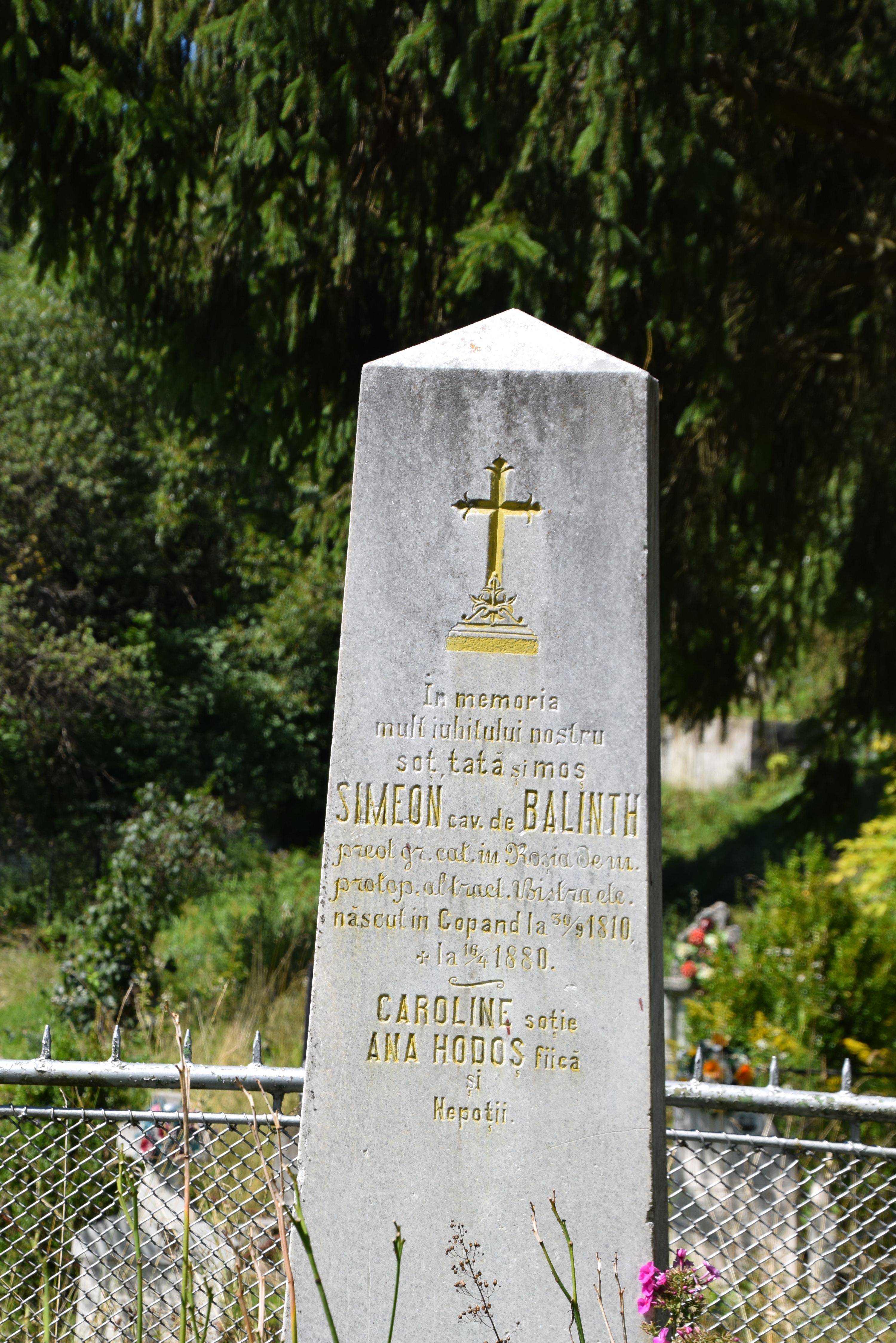 Monumentul comemorativ al lui Simion Balint